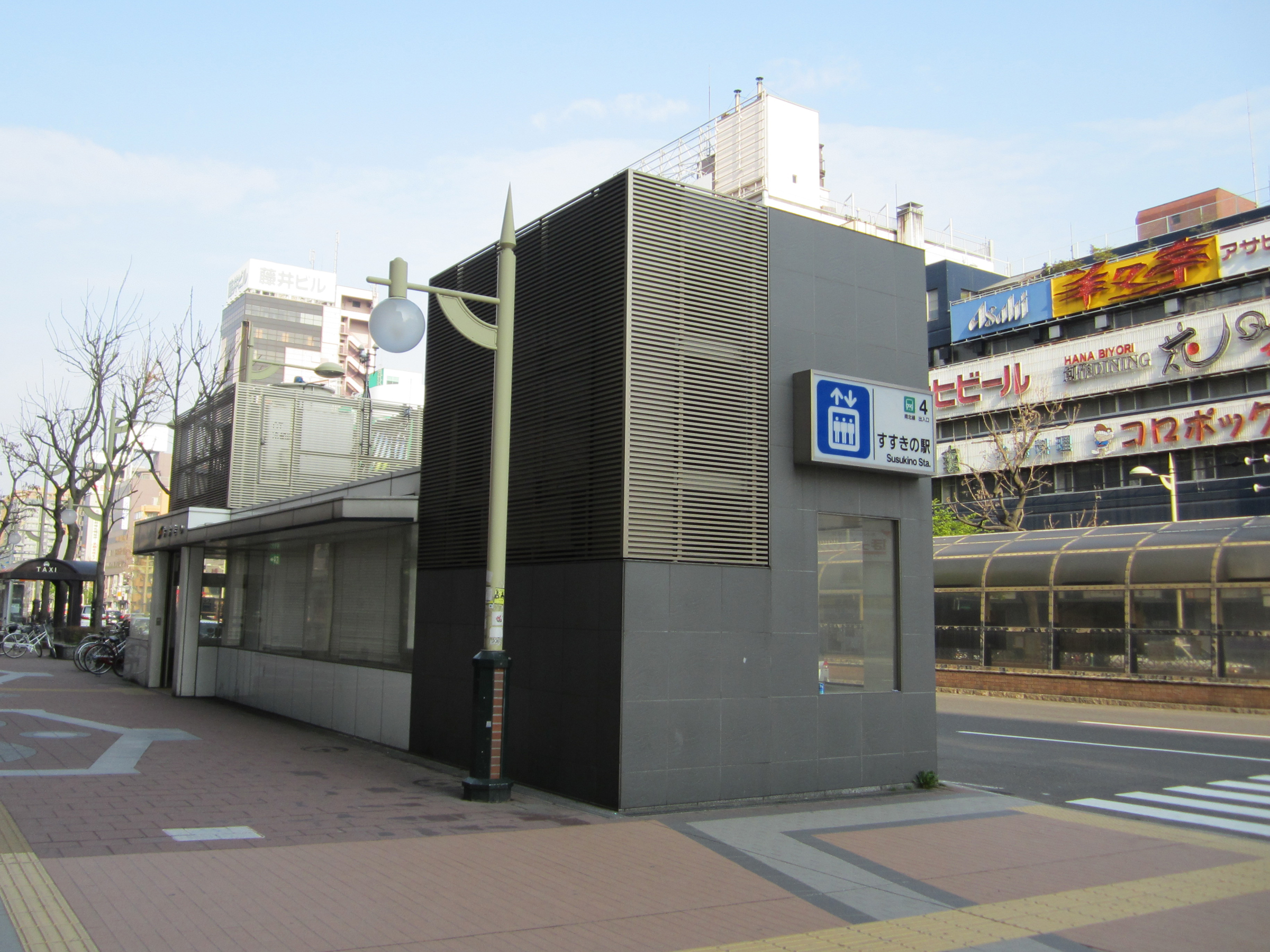 札幌市営地下鉄南北線すすきの駅4番出入口